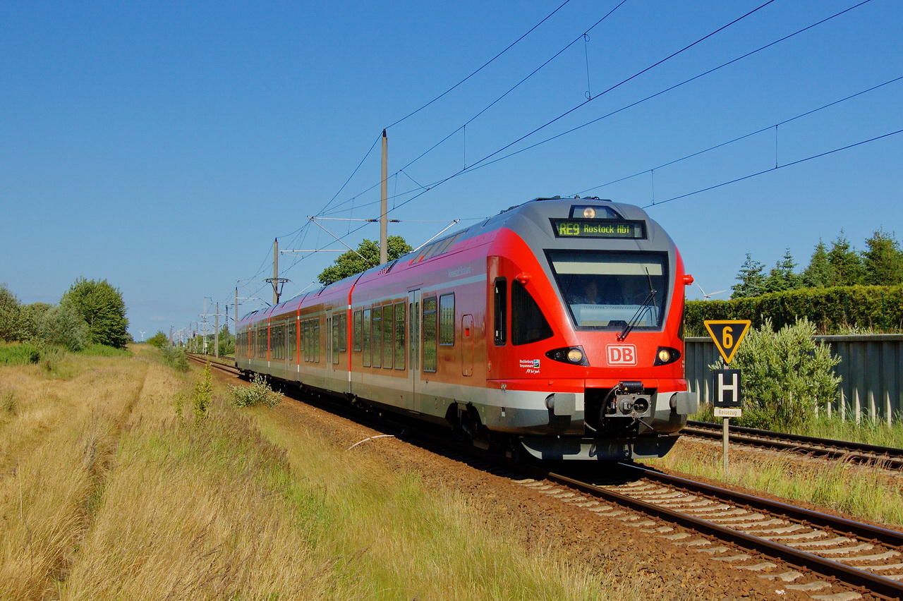 Stadler Flirt (Baureihe 429) kurz hinter Ribnitz-Damgarten in Behrenshagen.